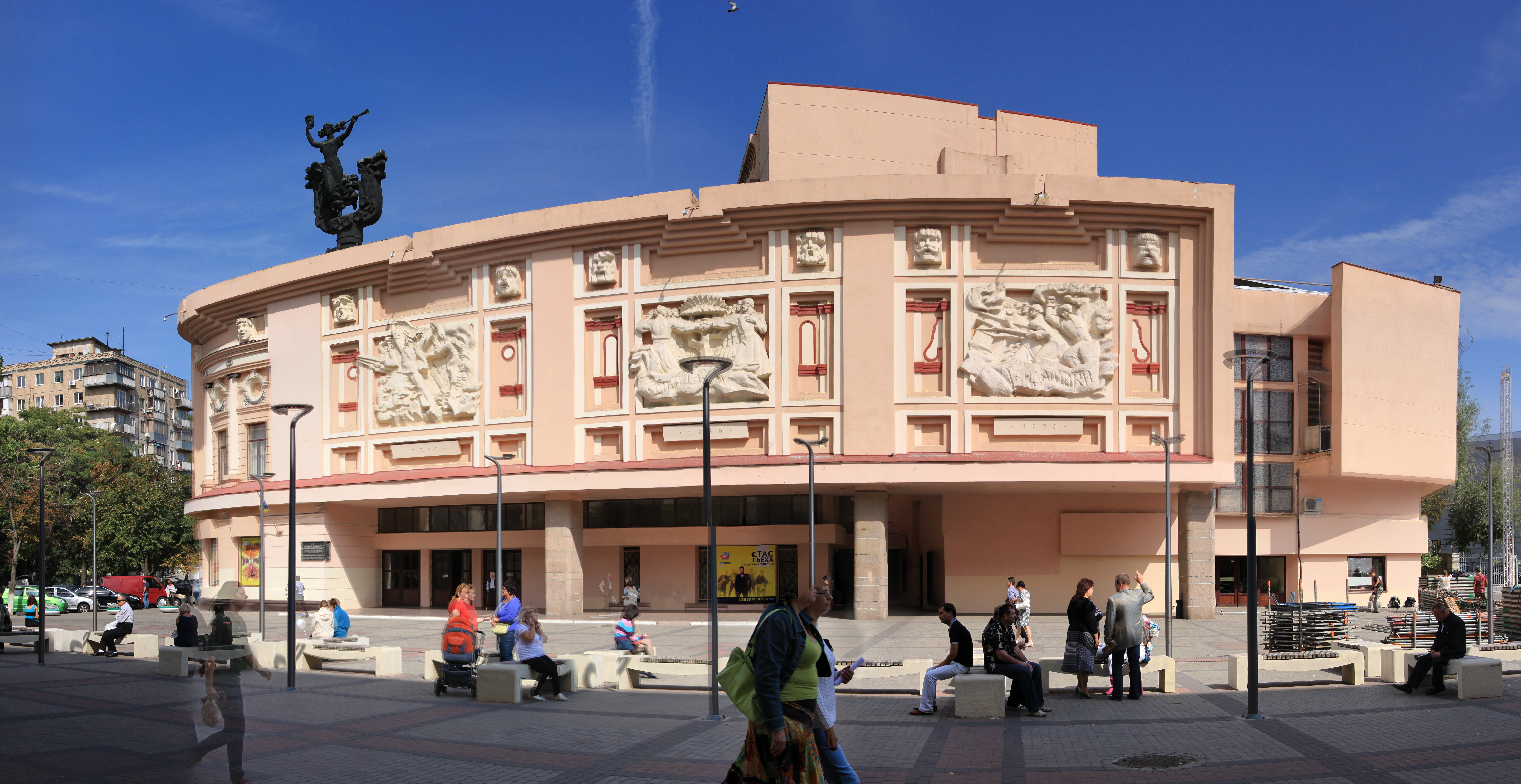 Будинок Театрально-концертного залу (мур.), Дніпропетровськ, вул.Леніна, 5